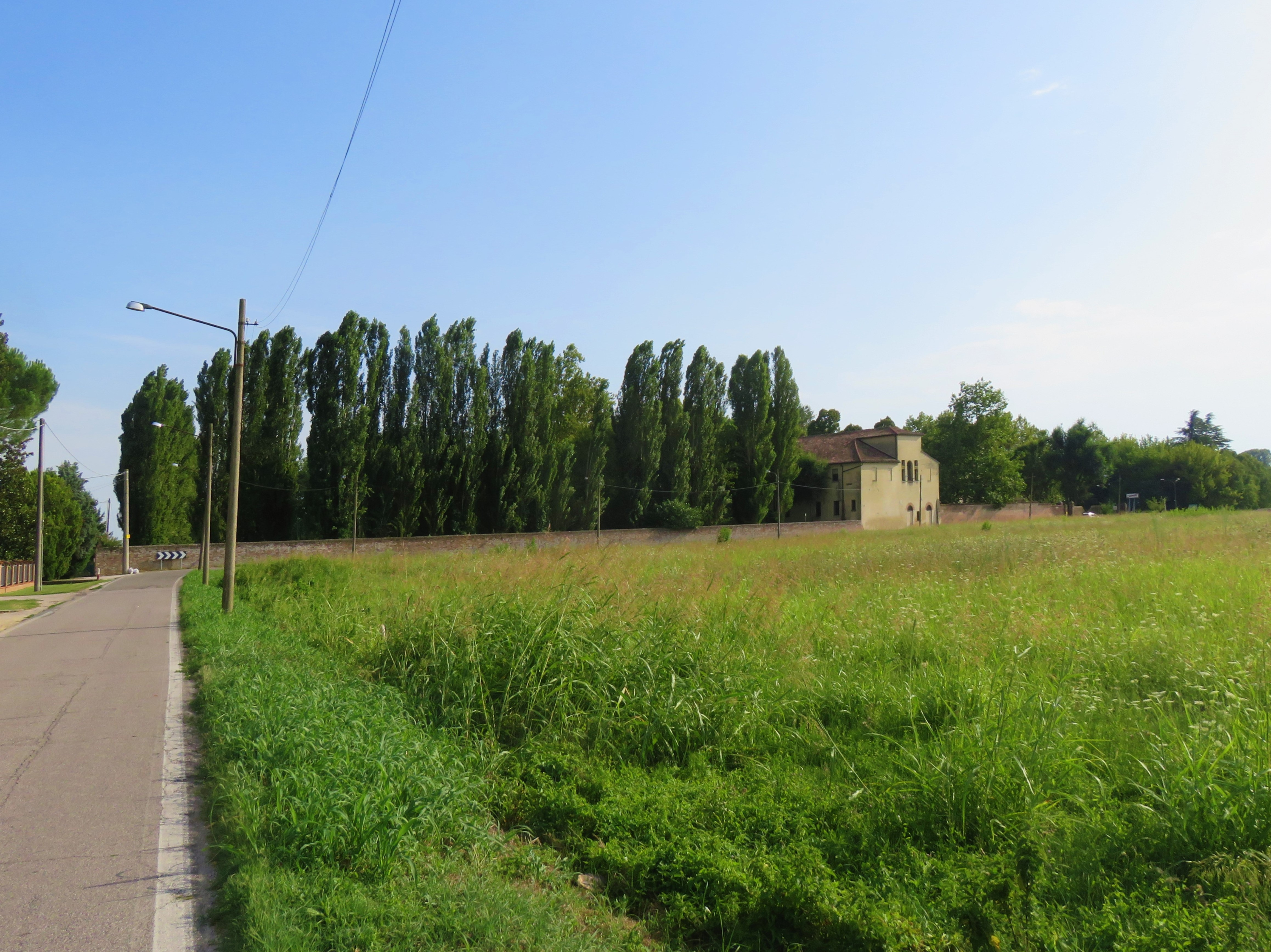 San Bartolo - Ferrara. Ex struttura manicomiale ora residenza psichiatrica.